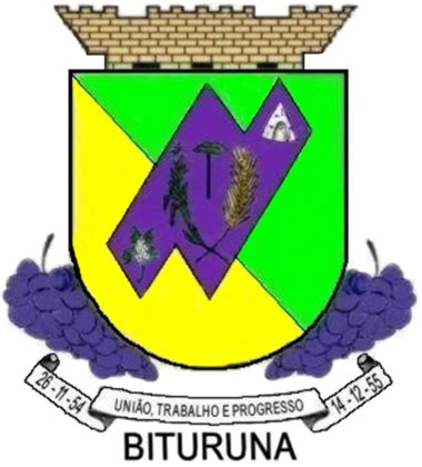 Brasão Oficial do Município de Bituruna-PR